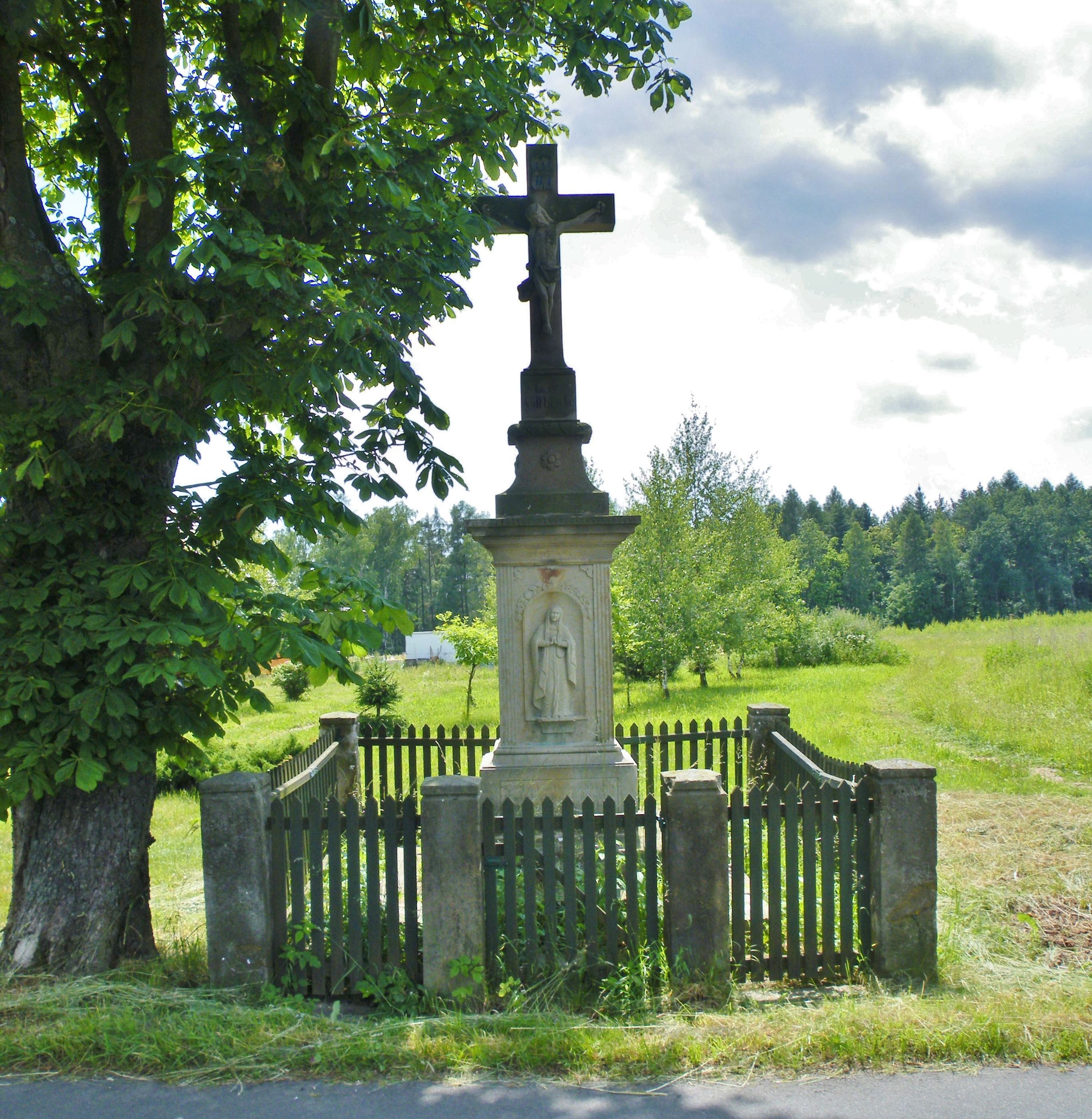 Nový Kohoutov kříž při siӀnici do obce